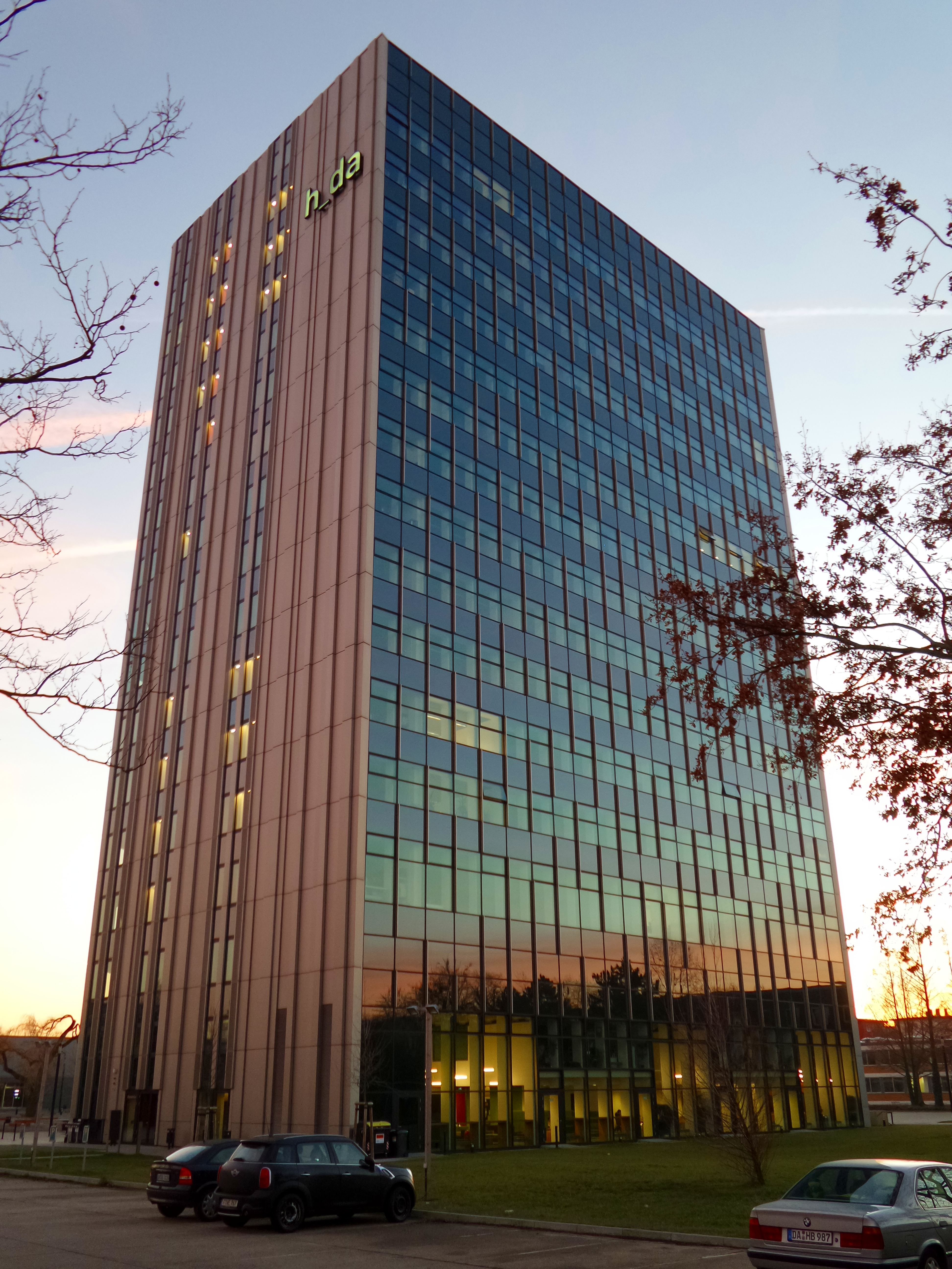 h_da-Hochhaus